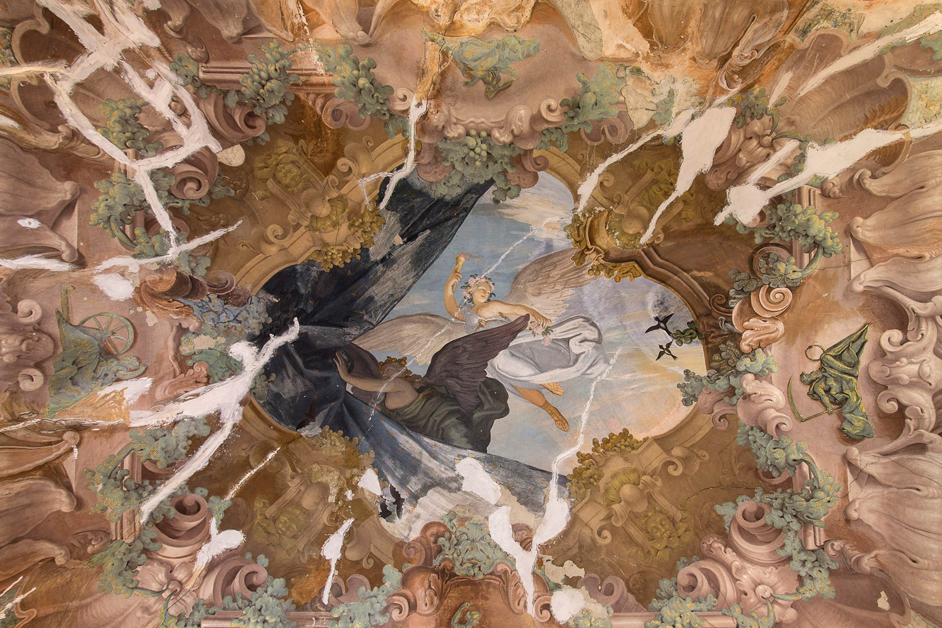 Affresco presente in una delle sale di Villa Cattani Stuart a Pesaro